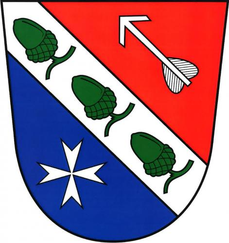 Miloňovice znak